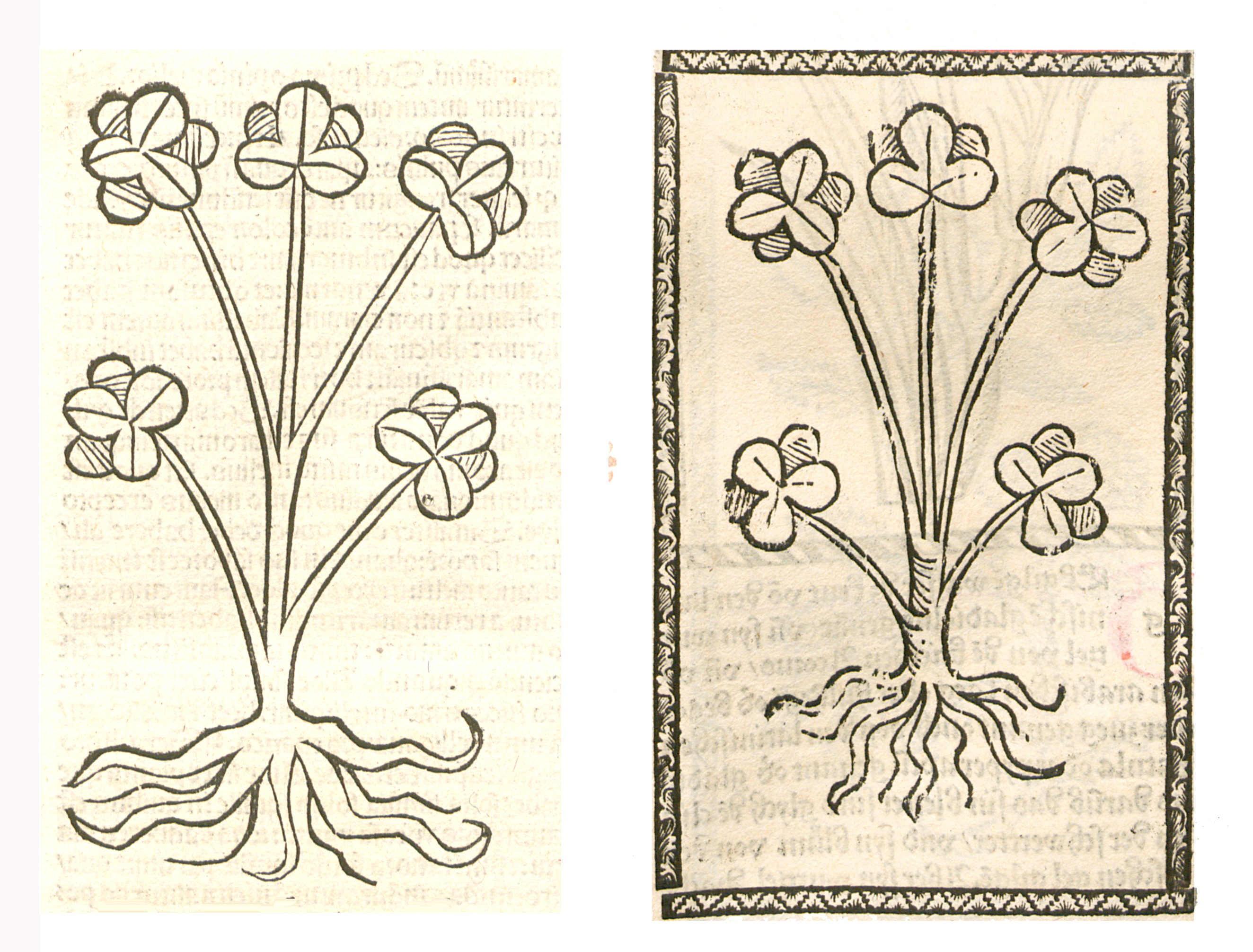 Abbildung von Güldin Cle (Hepatica nobilis)